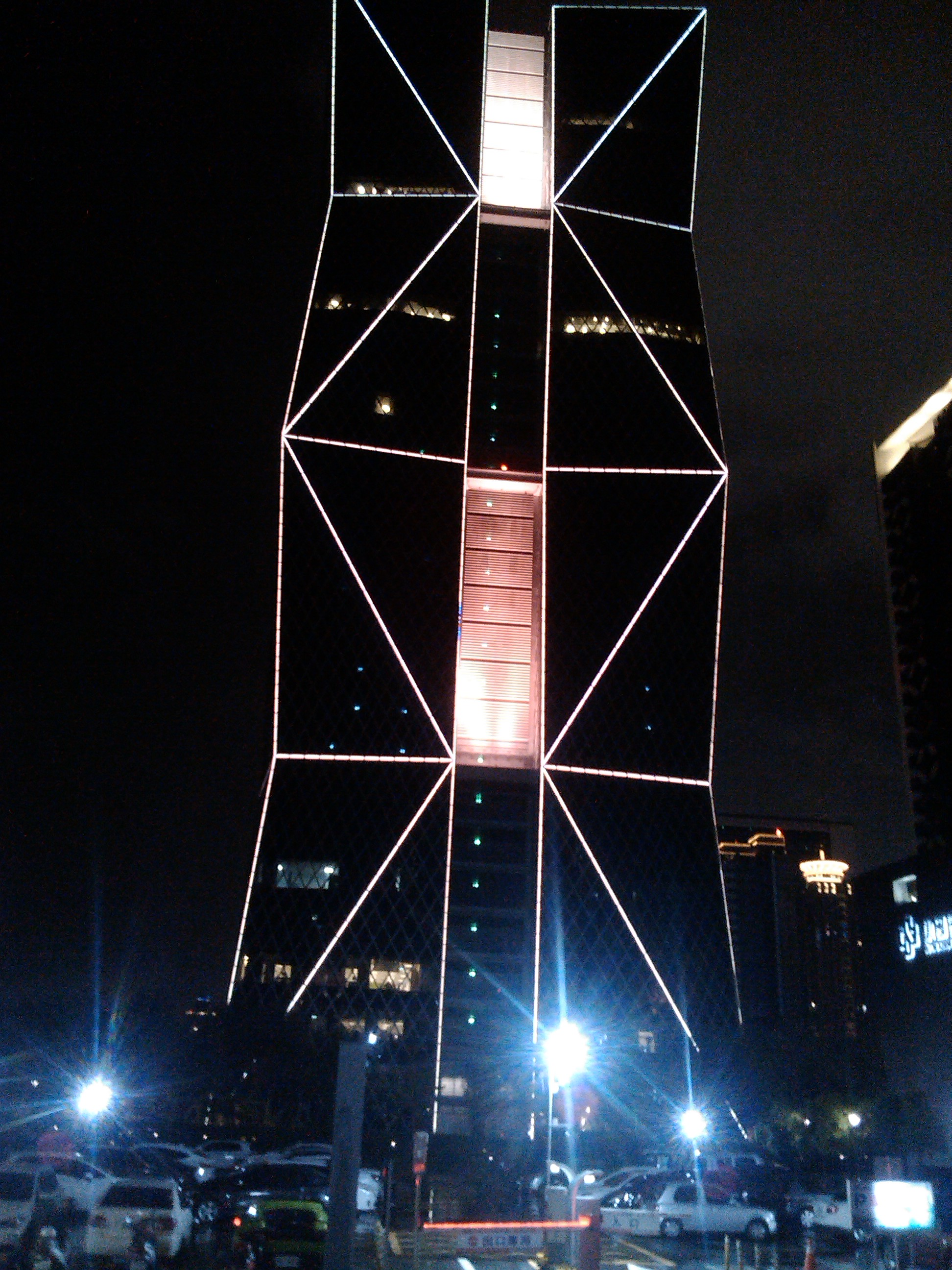 位於前鎮區中山路成功二路上 家樂福成功店後方